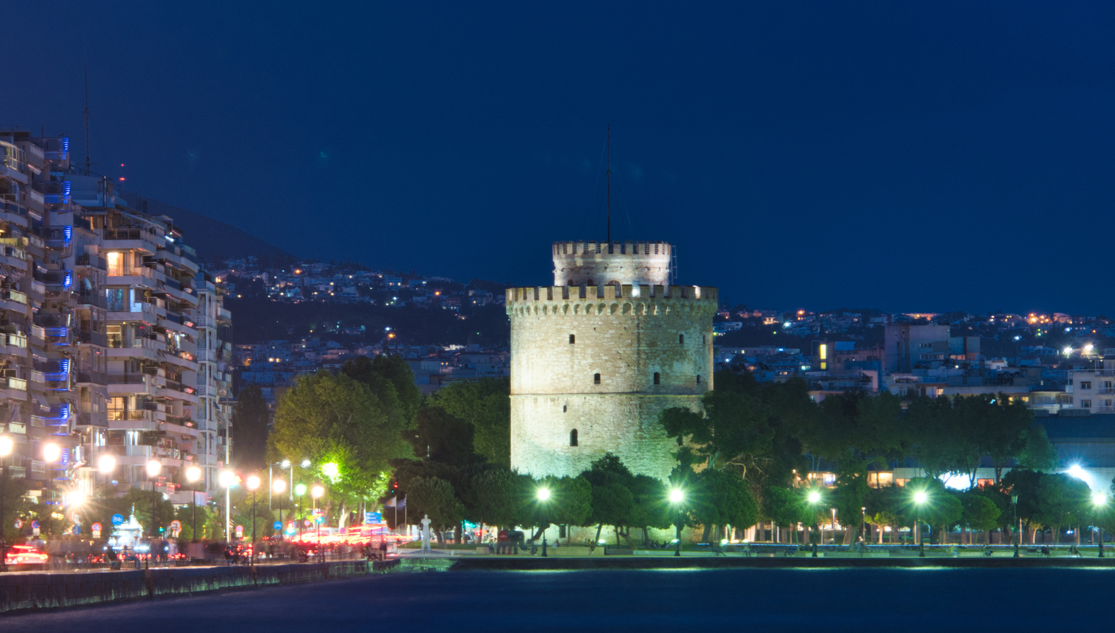 Thessaloniki / Θεσσαλονίκη